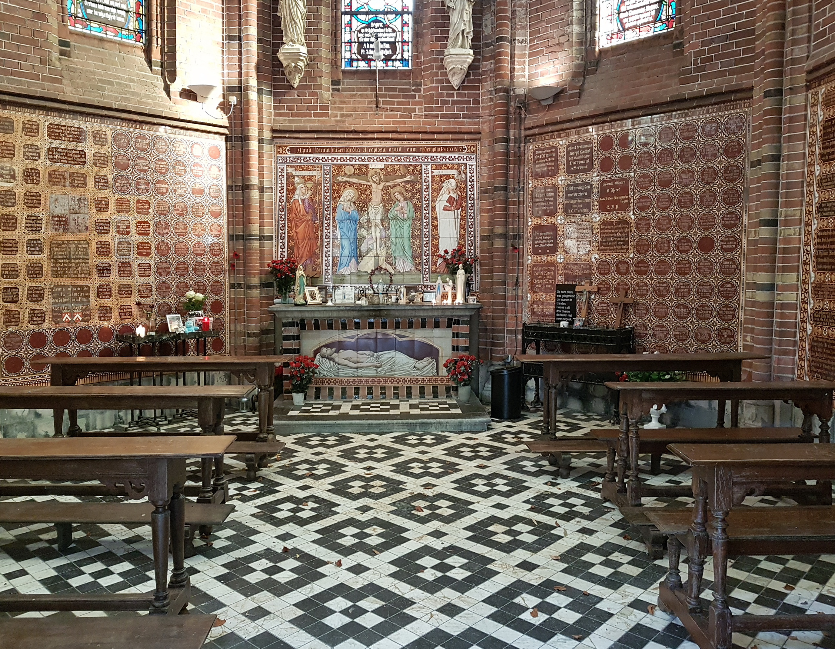 Interieur van de neogotische kapel (Joh. Kayser, 1885-90) op de Algemene Begraafplaats Tongerseweg in Maastricht. Tegen de wanden zijn rondom ex voto tegels bevestigd.